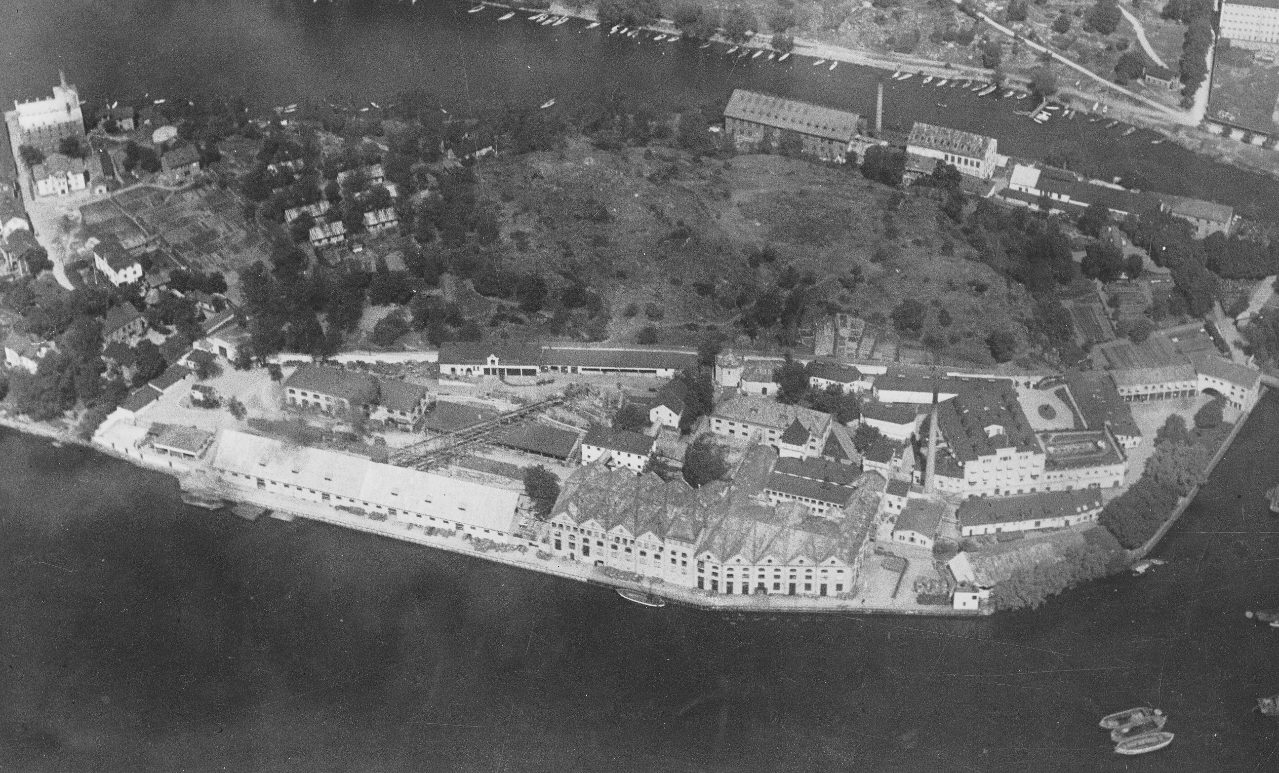 Reymersholms Spritförädlings AB och Stockholms Yllefabrik på Reimersholme innan HSB byggde sina bostäder där.